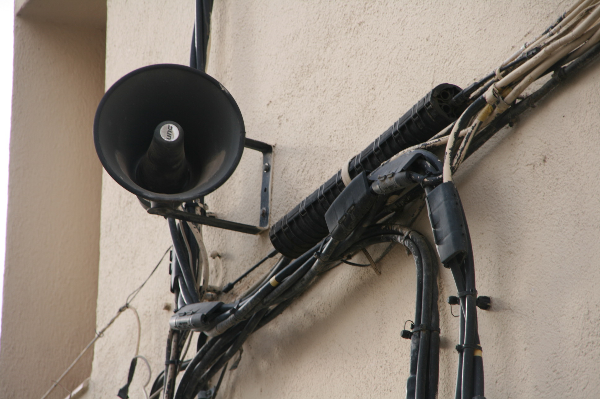 Sistema d'altaveu utilitzat pels pregons o bandos. Aldover.